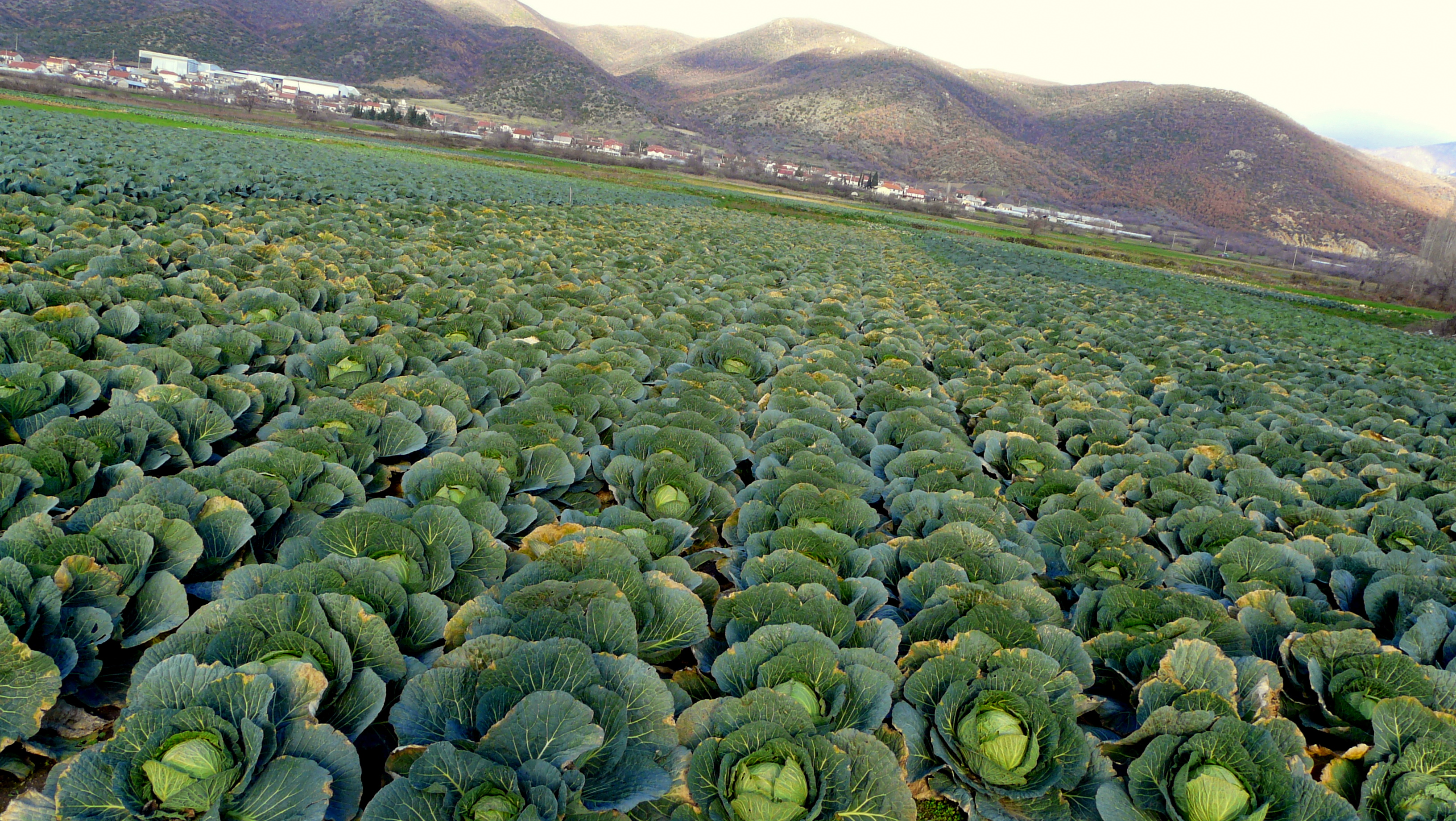 Brassica oleracea var. capitata in Dojran region, Macedonia